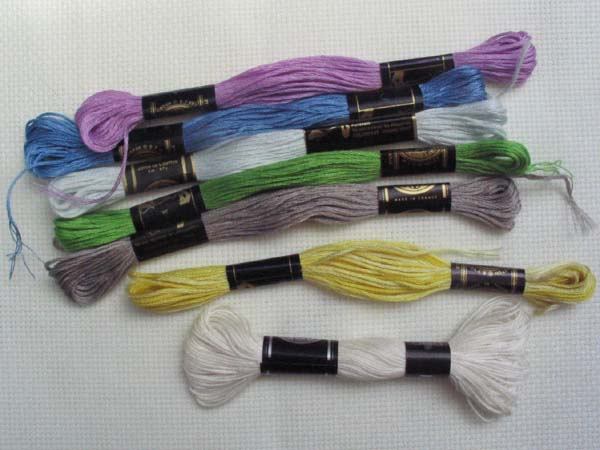 Borduurgarens